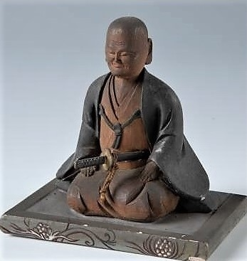 大久保教寛の木像。